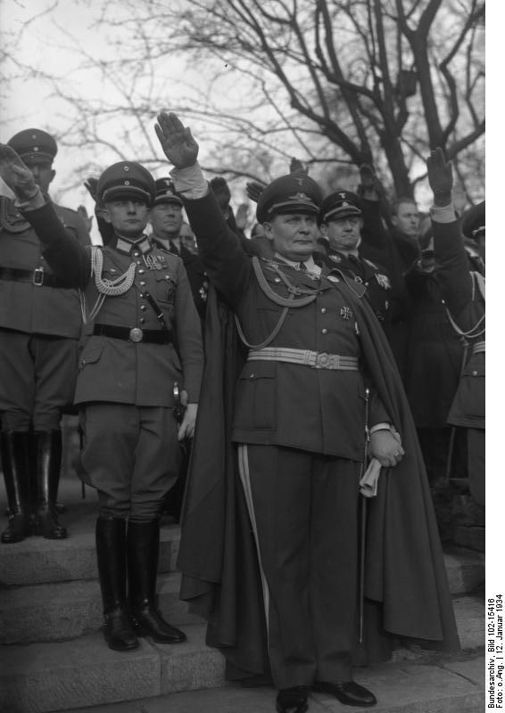 Der 41. Geburtstag des preußischen Ministerpräsidenten Hermann Göring in Berlin! Neueste Aufnahme des preußischen Ministerpräsdenten Hermann Göring , am Tage seines 41. Geburtstages im Garten seines Palais in der Leipzigerstrasse in Berlin